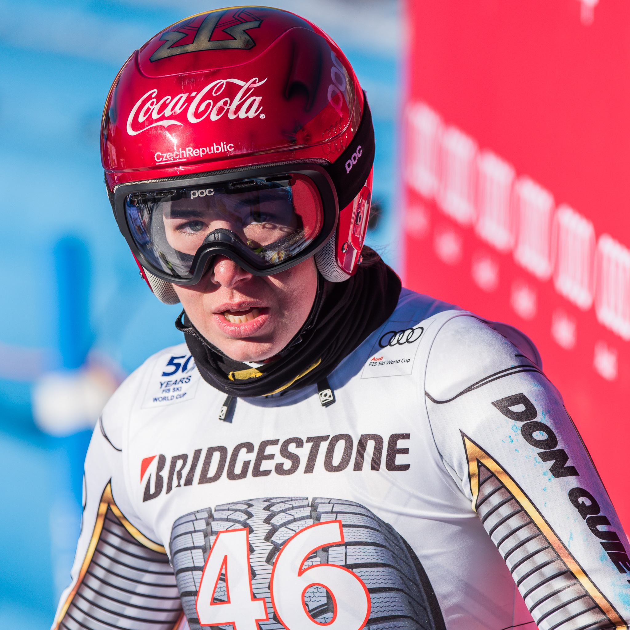 64. Kandahar Rennen,Audi FIS Ski Weltcup Garmisch-Partenkirchen,Damen Super-G,Ester Ledecka,Ester Ledecká,Kandahar,Ladies Super-G